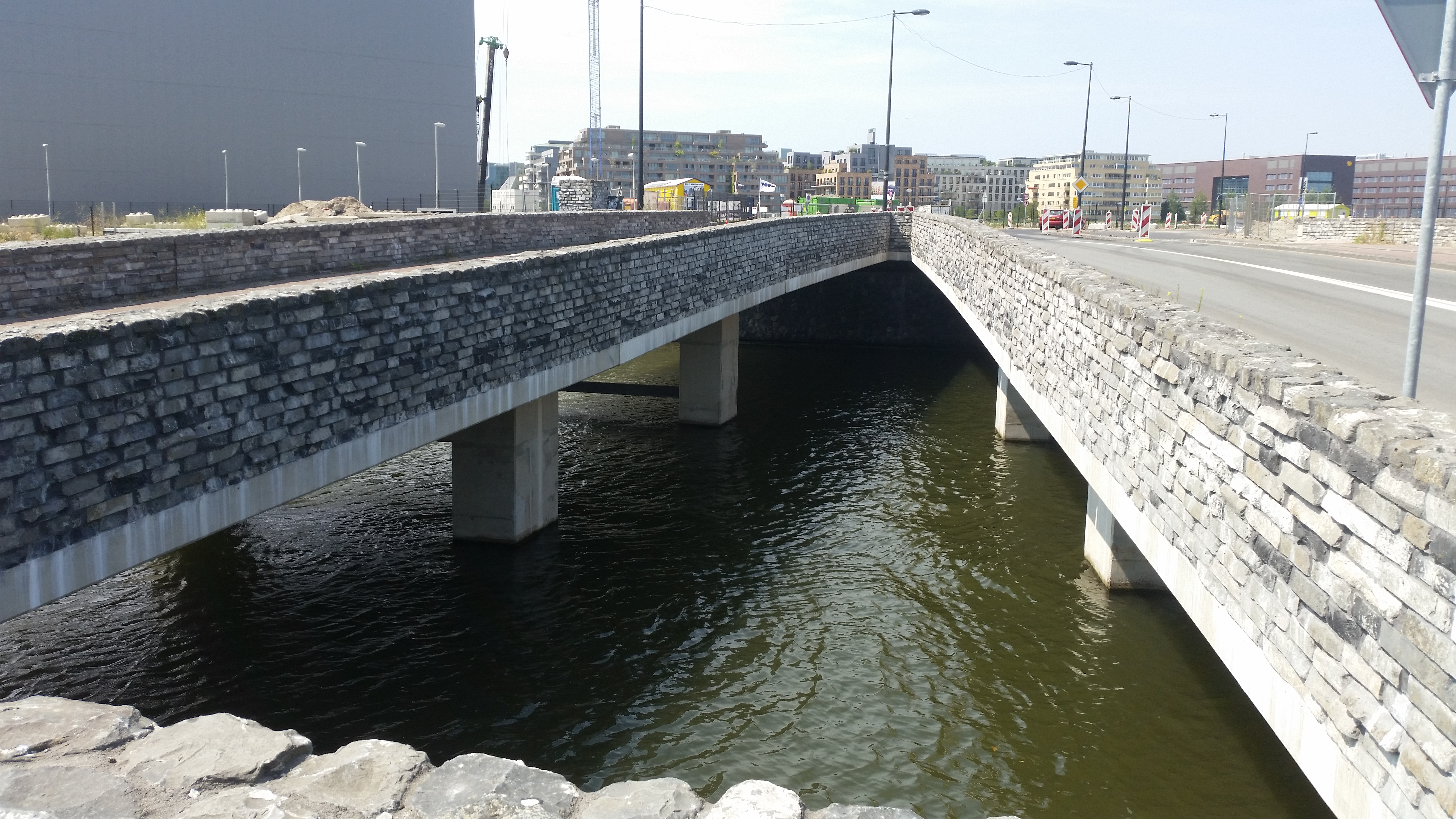 water zichtbaar tussen brugdelen van Brug 995, Van der Pekbrug